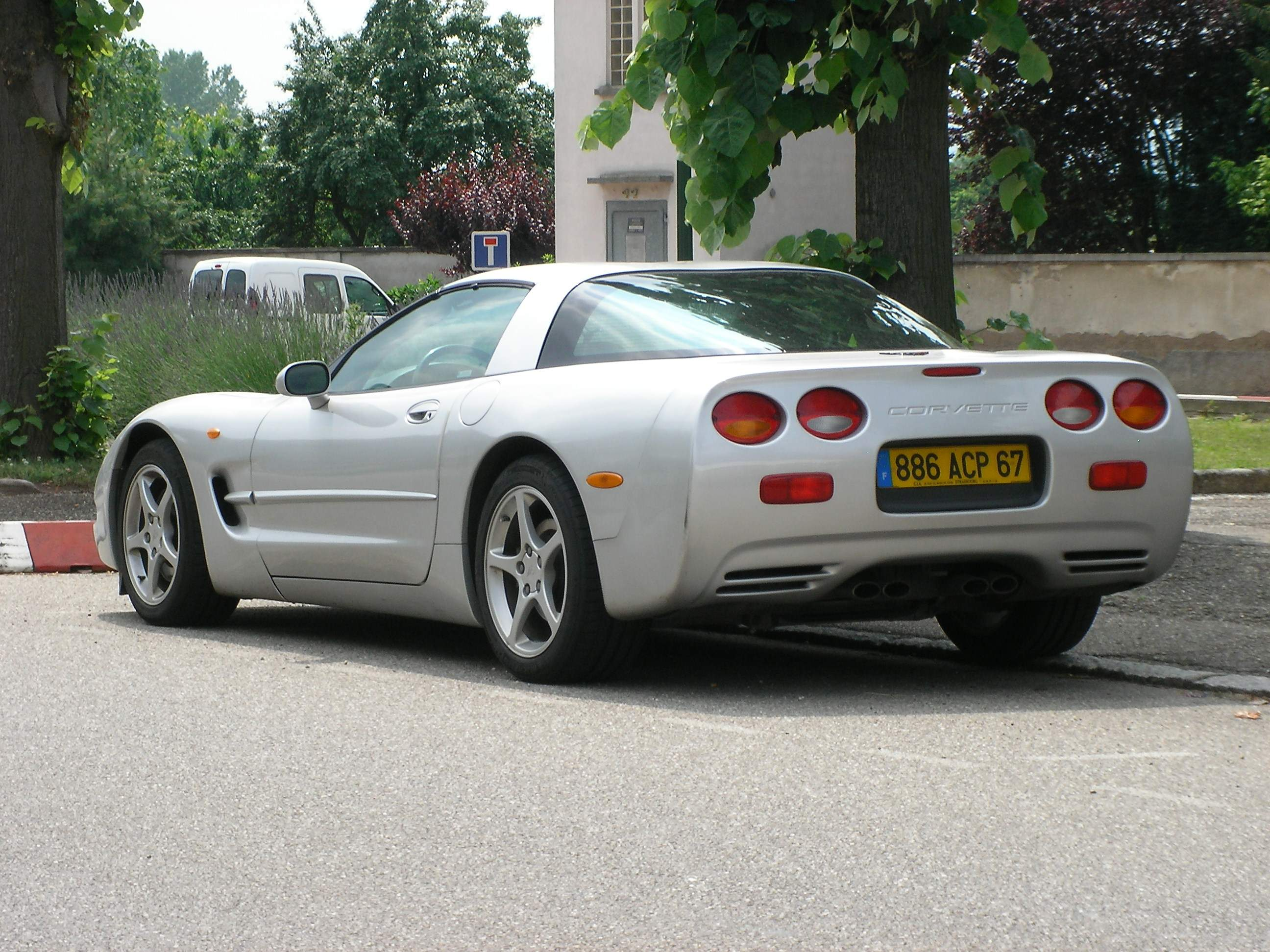 Chevrolet Corvette C5 vue de l'arrière à Ostheim (Haut-Rhin, France).